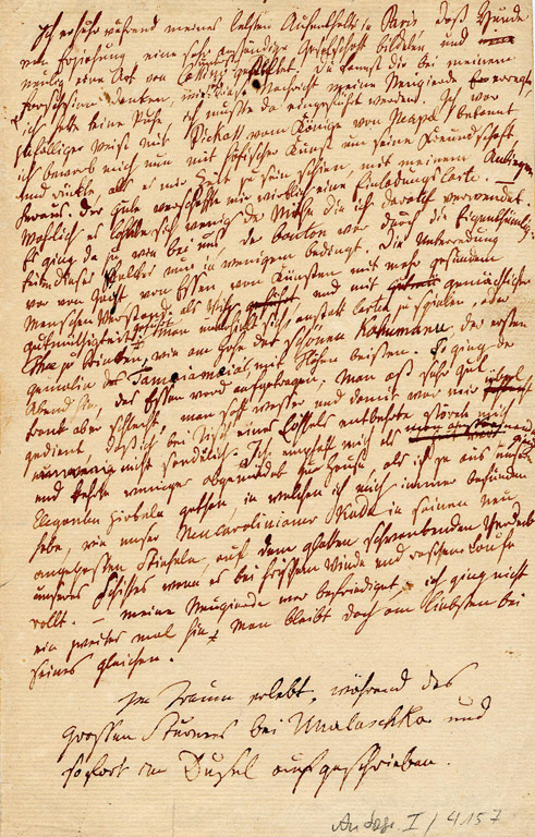 Traumnotat mit Nachschrift, Während der Sturmnächte an Bord der Rurik vor Unalaschka, 11.-14. April 1817